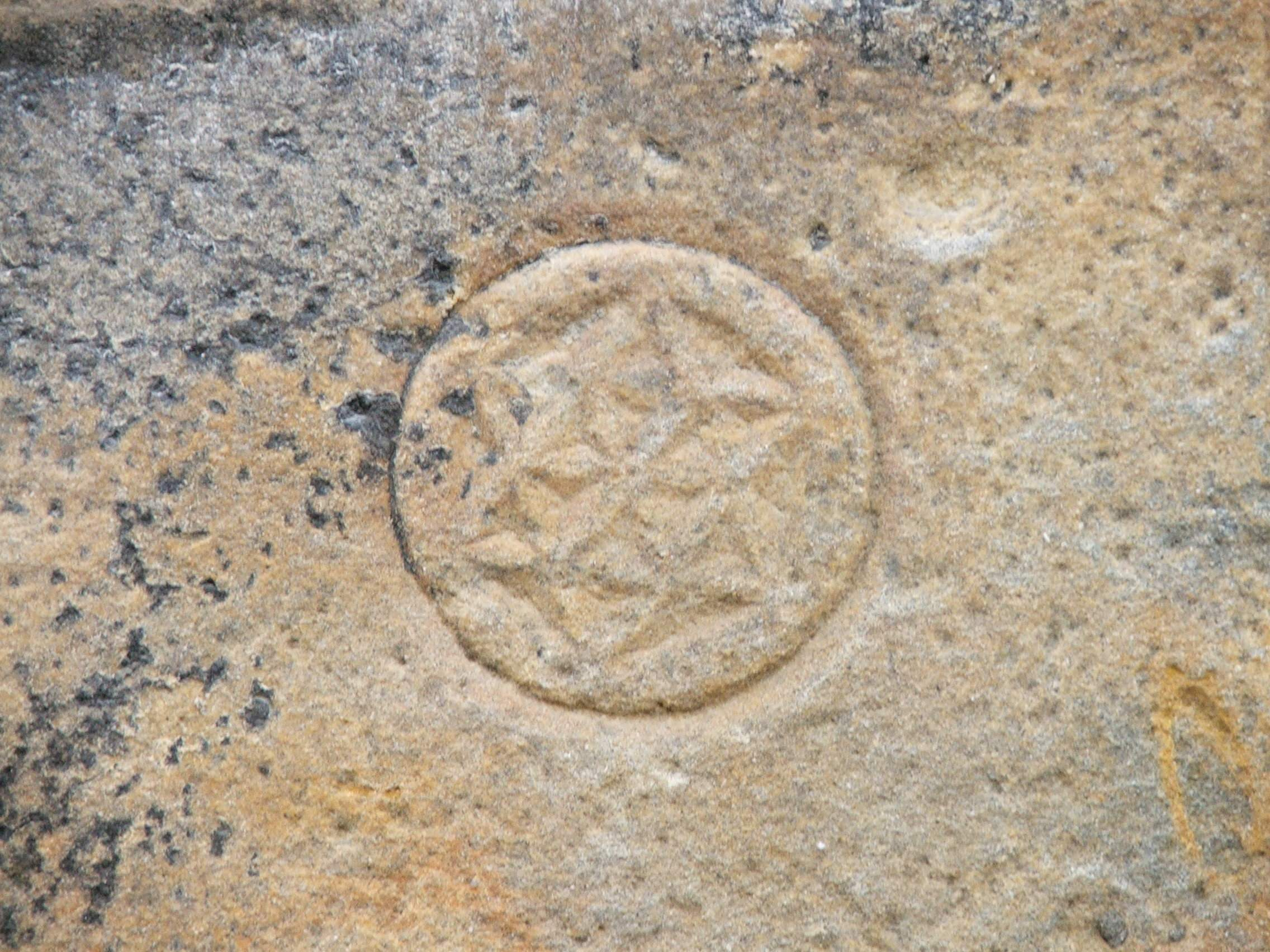 Török kőfaragó mester jegye